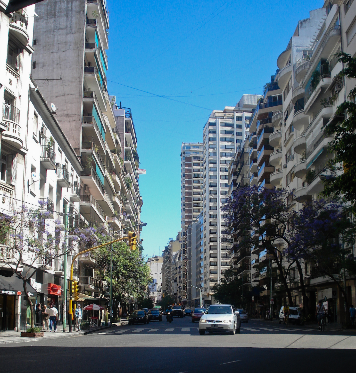 Callao Avenue, Buenos Aires.